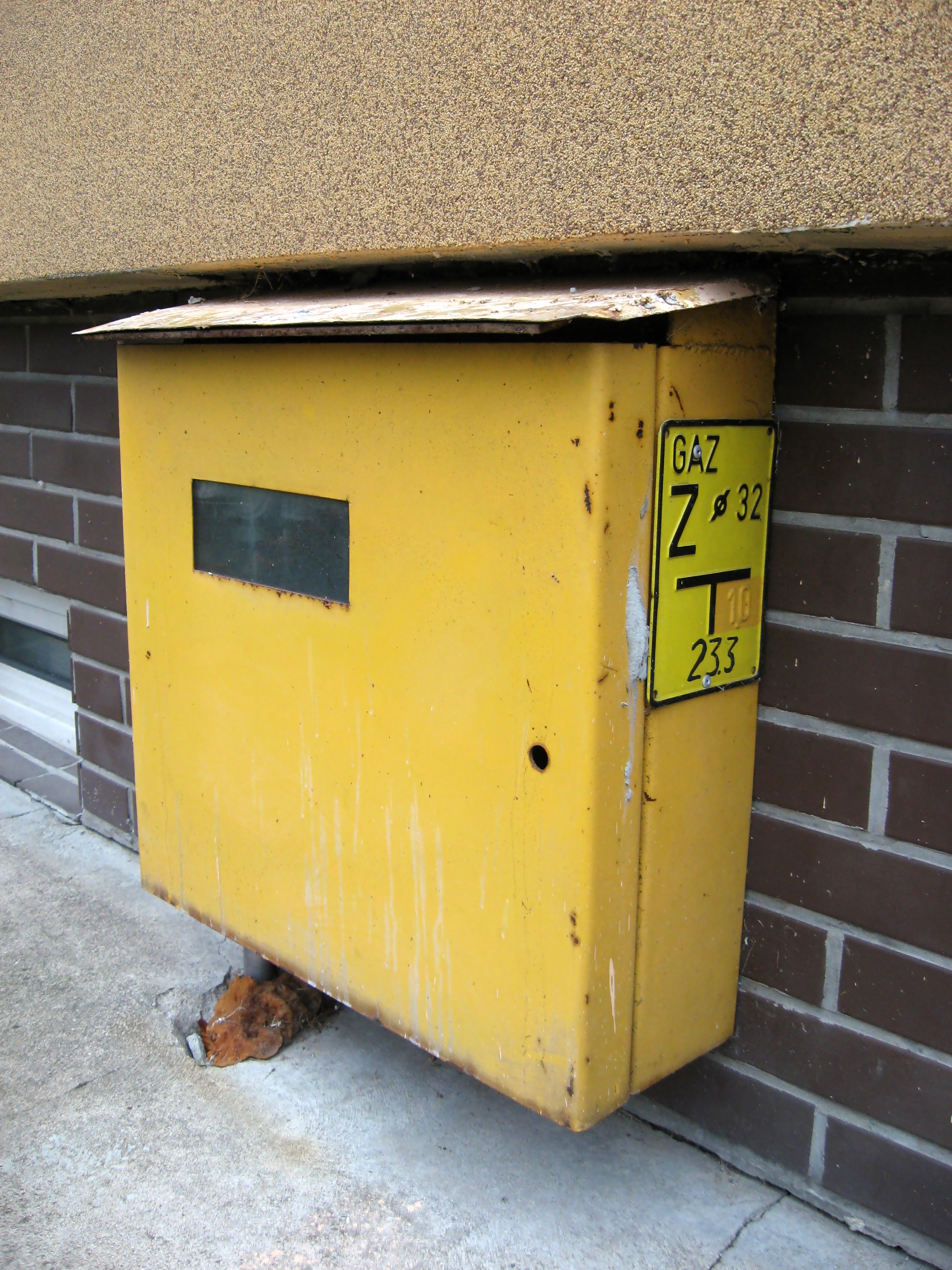 Żółta skrzynka gazowa na elewacji budynku w Polsce.